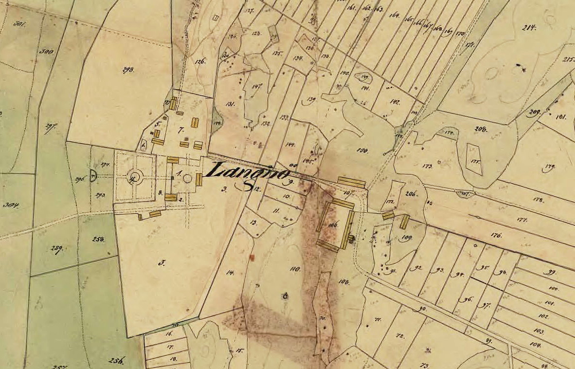 Lagnö säteri, Aspö socken